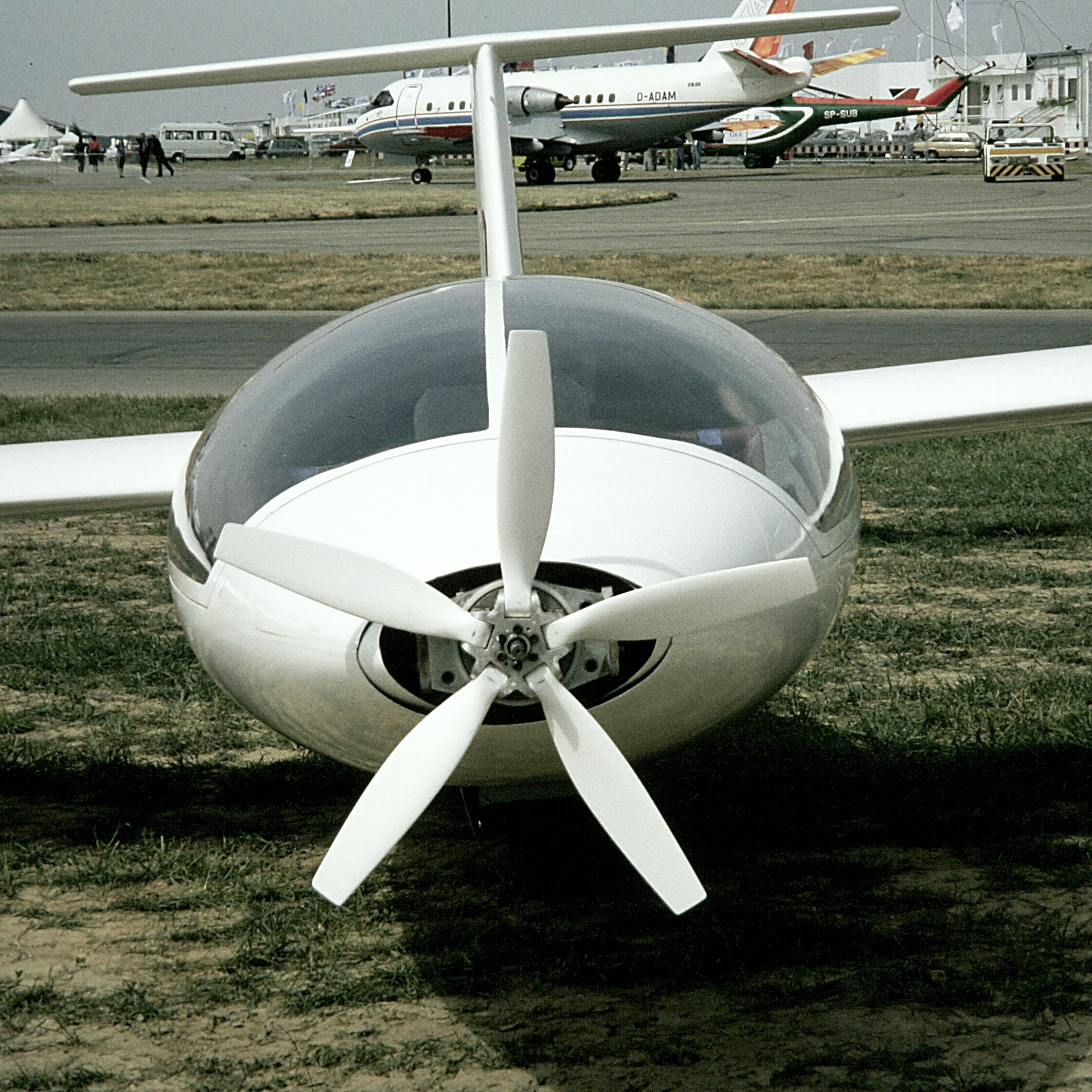 Motorsegler B13 der Akademischen Fliegergruppe Berlin mit ausgefahrenem Propeller der Bauart Oehler auf der Internationalen Luftfahrtausstellung in Schönefeld bei Berlin